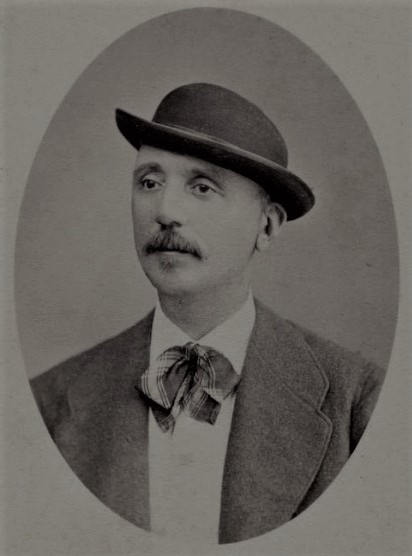 Tiziano Pagan de Paganis